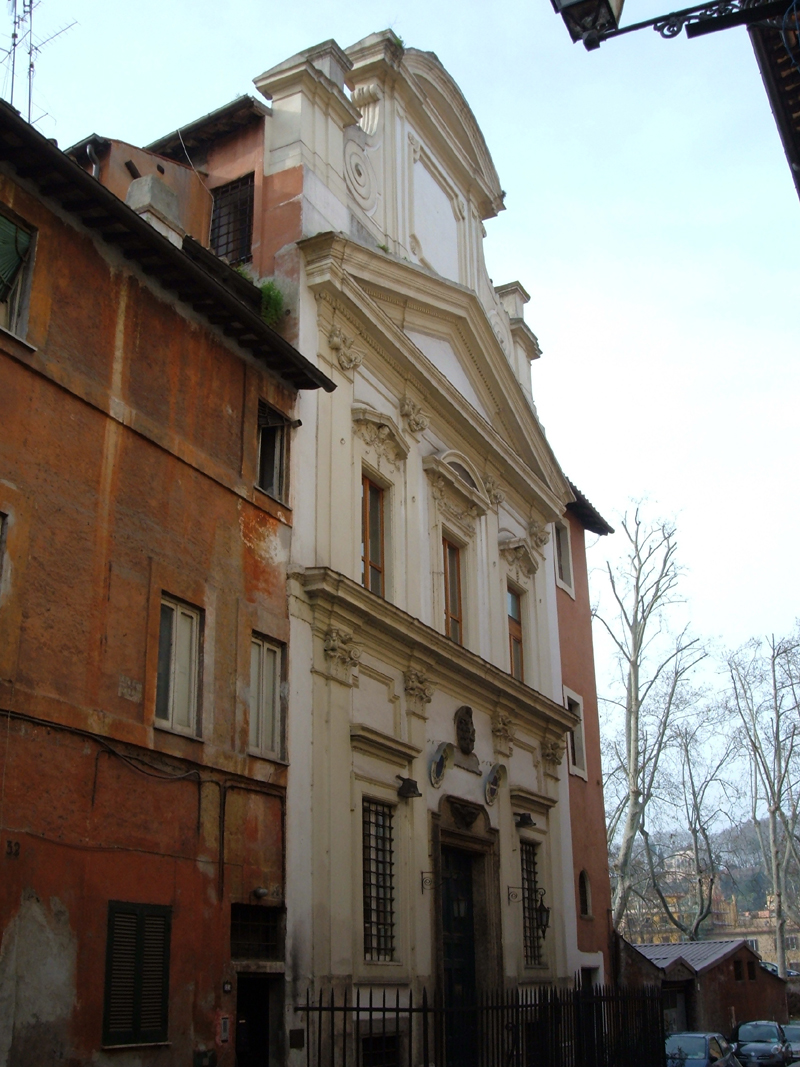 Oratorio del Gonfalone, chiesa sconsacrata di Roma nel rione Ponte.